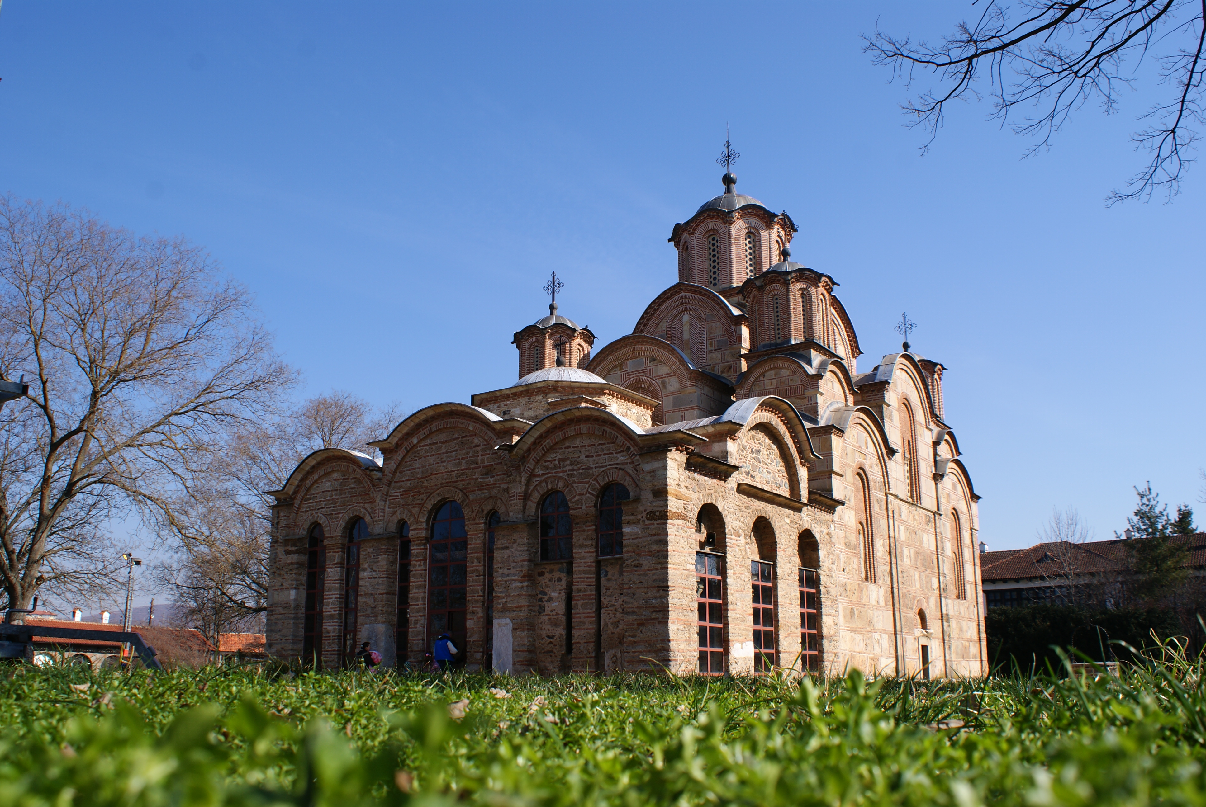 Manastiri i Graçanicës